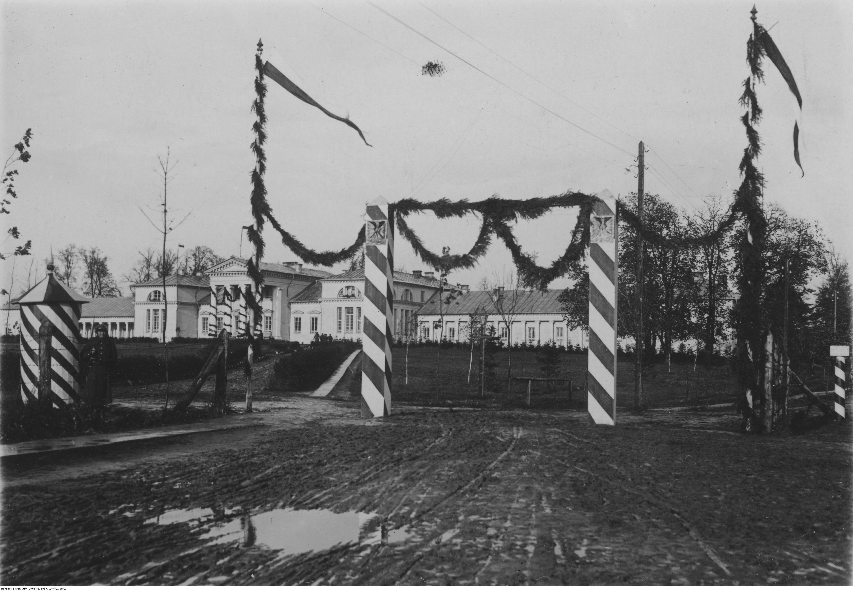 Obchody X- lecia istnienia Korpusu Ochrony Pogranicza w Batalionie KOP "Snów" w Snowie; udekorowana brama wjazdowa do koszar. Ilustrowany Kurier Codzienny - Archiwum Ilustracji.